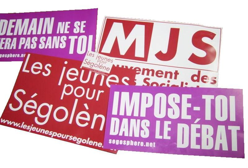 Pancartes utilisées par les militants et sympathisants dans les meetings de Ségolène Royal pour la campagne présidentielle de 2007 (de l'image Panneaux Ségolène.jpg)